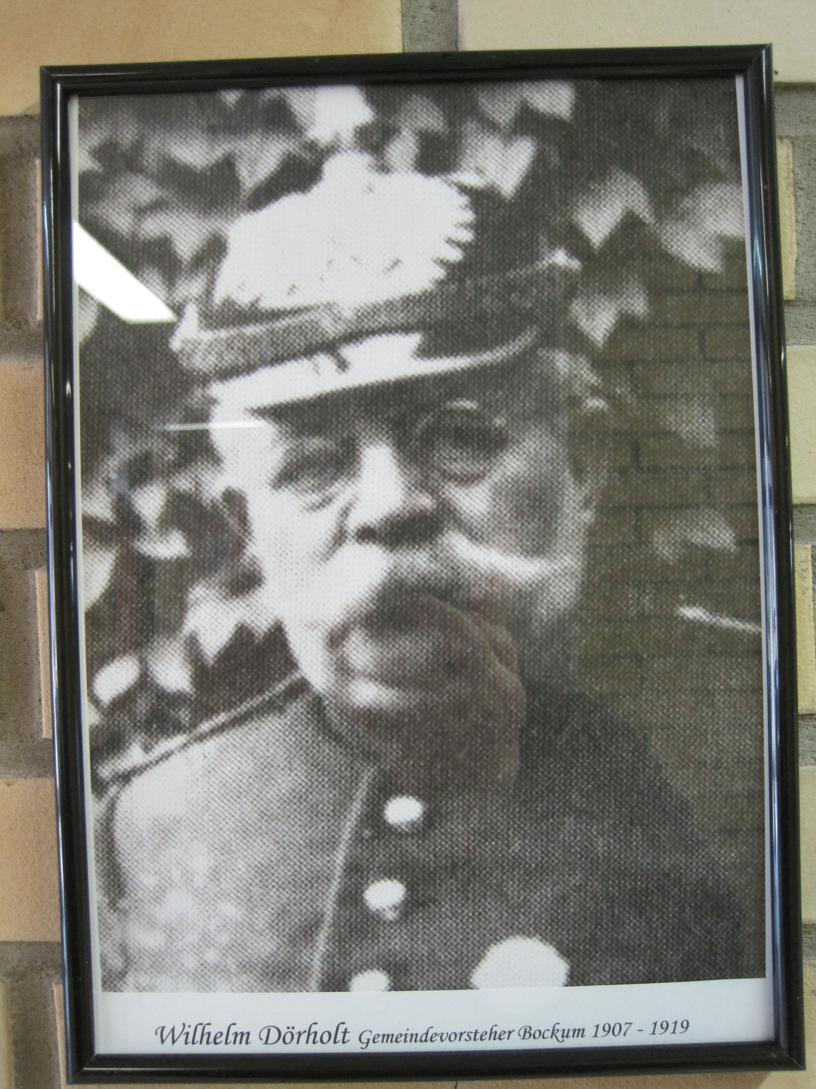 Das Foto zeigt ein Bild im Rathaus Bockum-Hövel.